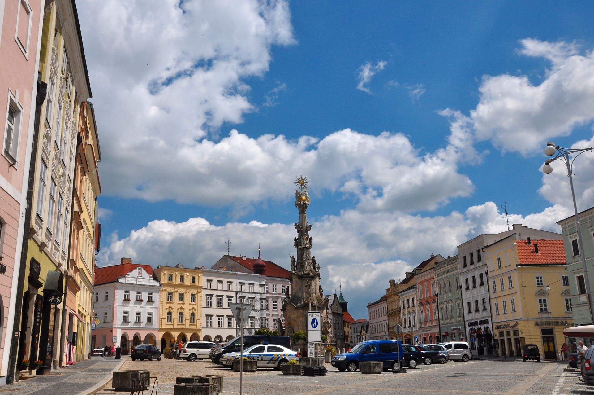 Jindrichuv Hradec / Neuhaus